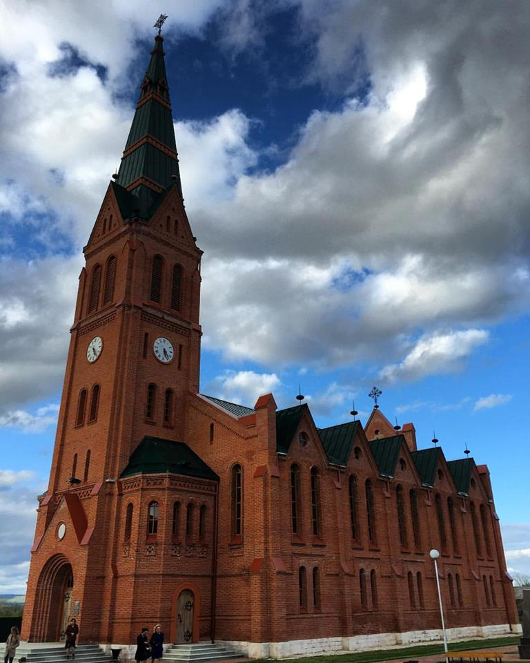 Lutherische Kirche Zorkino, Russland